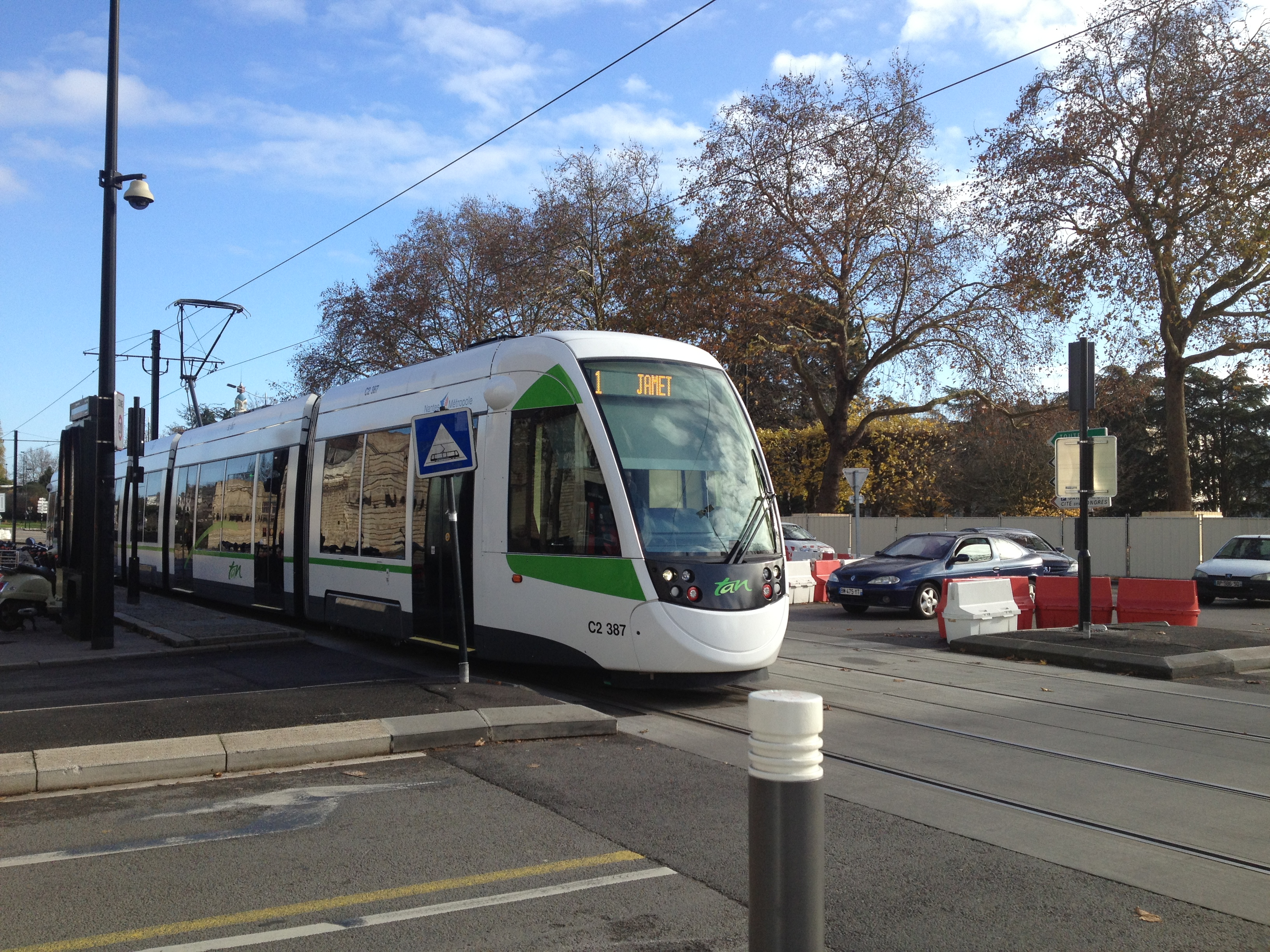 Tramway de Nantes (3e génération), Ligne 1 (arrêt Duchesse Anne) devant le château des ducs de Bretagne.